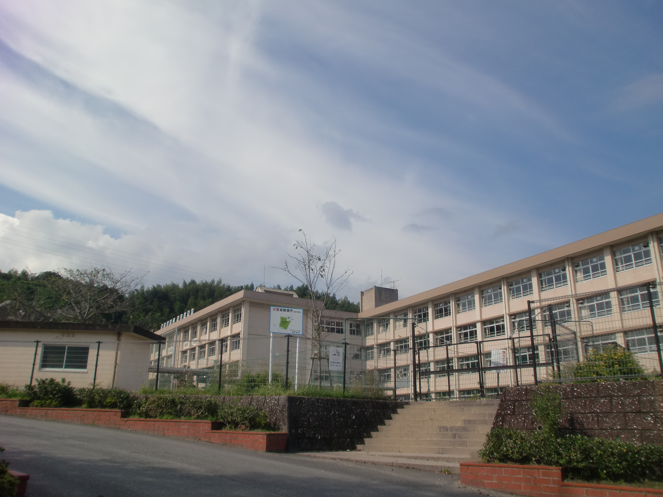 鹿児島市立和田中学校の外観。